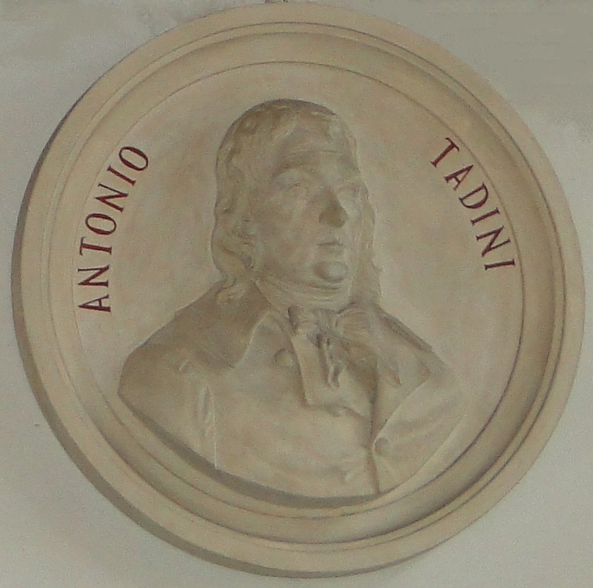 Antonio Tadini, matematico ed ingegnere italiano. Medaglia presso Biblioteca Angelo Mai di Bergamo.